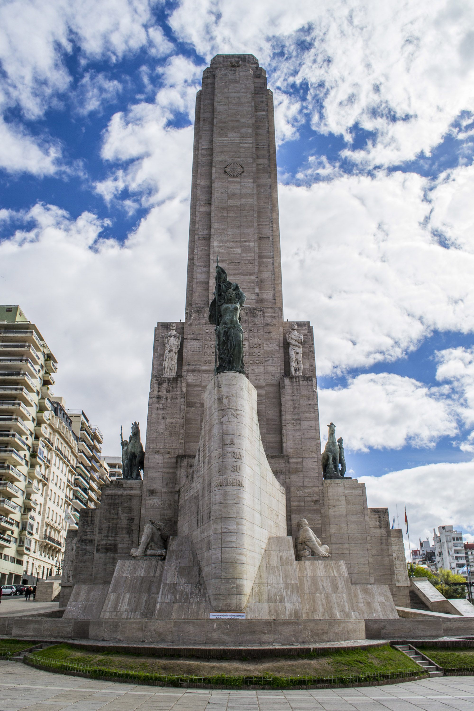 Fotografía del Monumento Nacional a la Bandera, ubicado en la ciudad de Rosario, provincia de Santa Fe, Argentina.